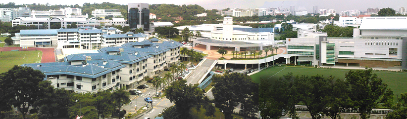 ACS(i)